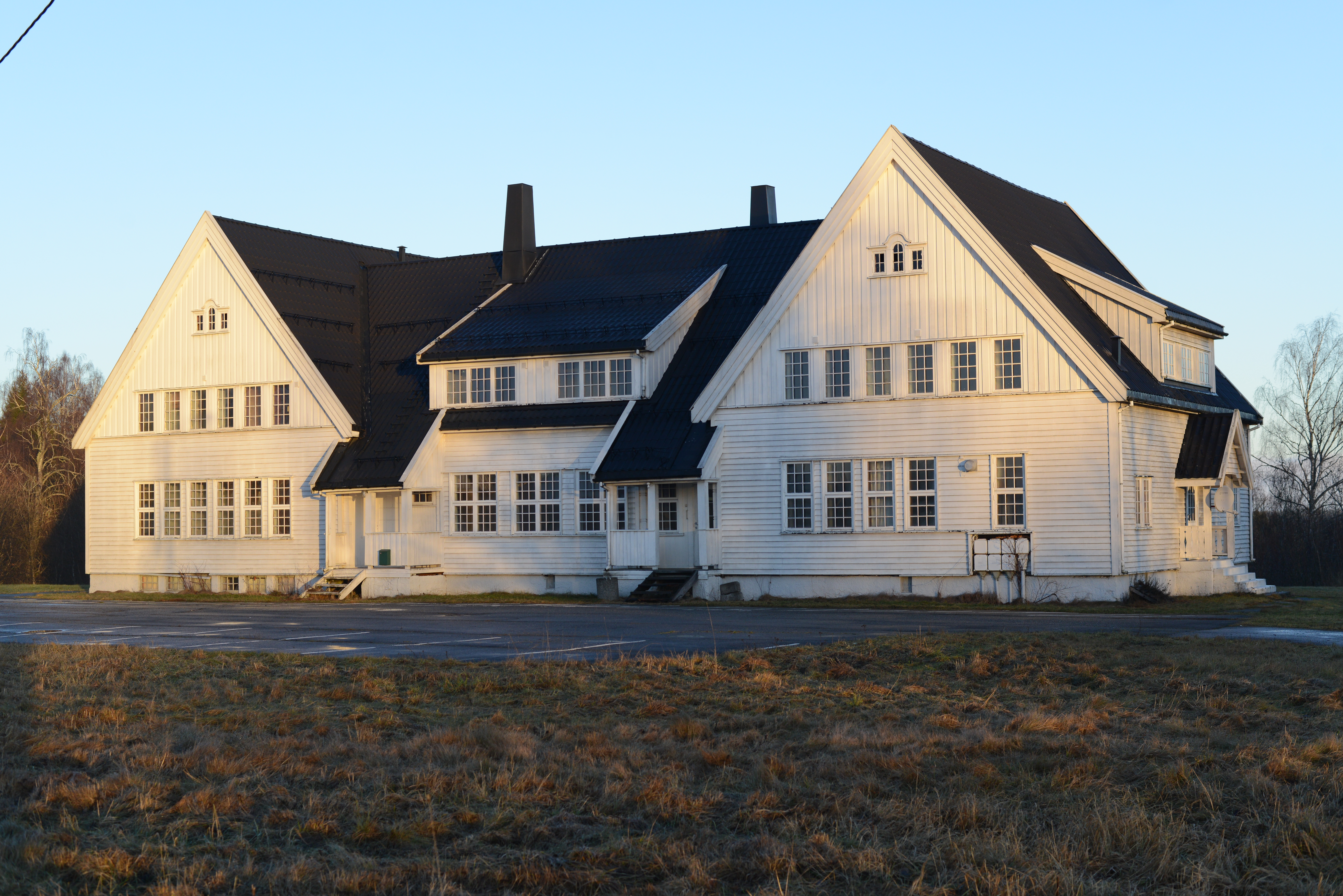 Bygning ved Trandum leir